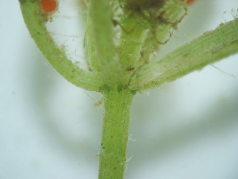 Gegensätzliche Armleuchteralge Chara contraria, Astquirl, Müritz-Gebiet